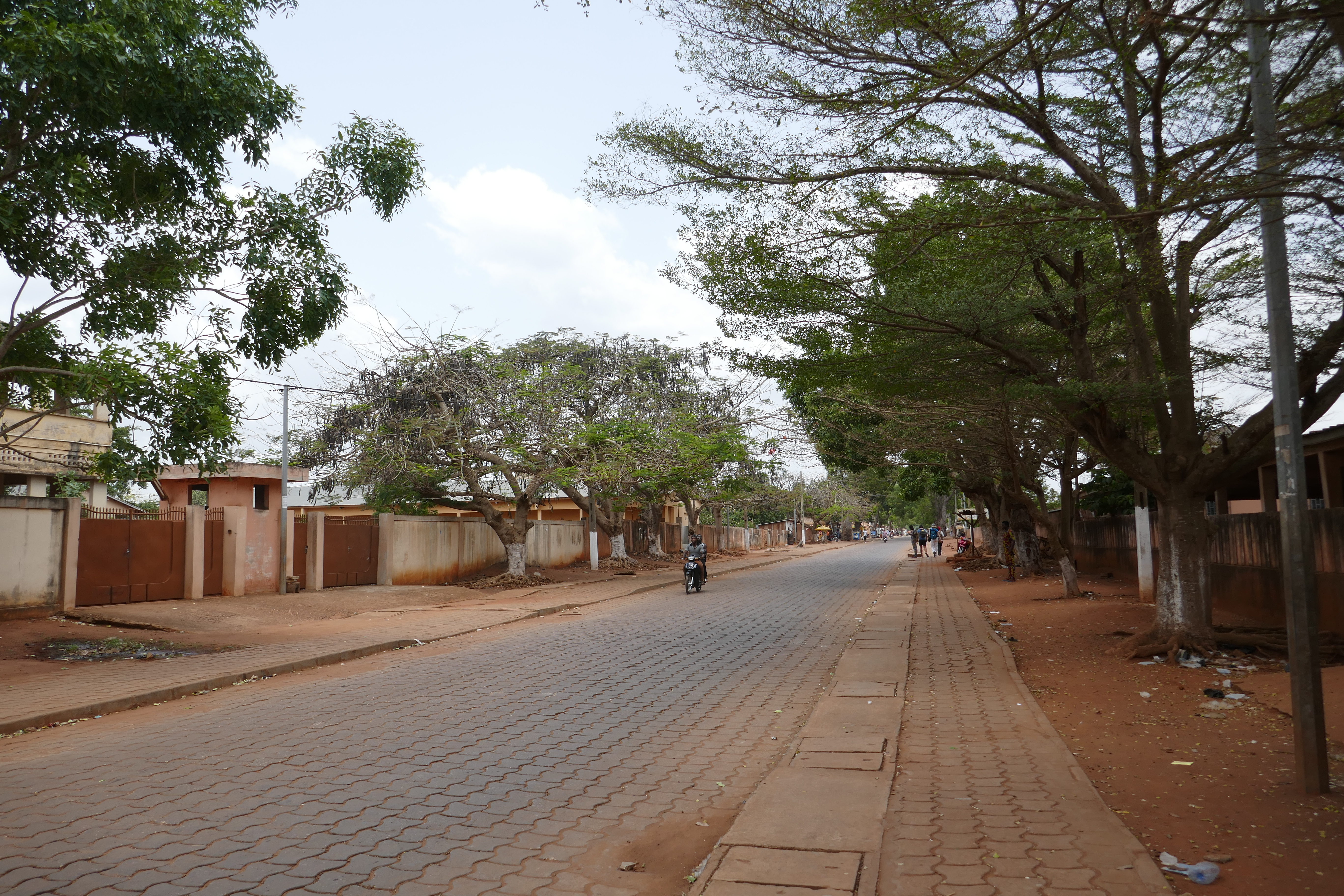 Une rue d'Abomey (Bénin).